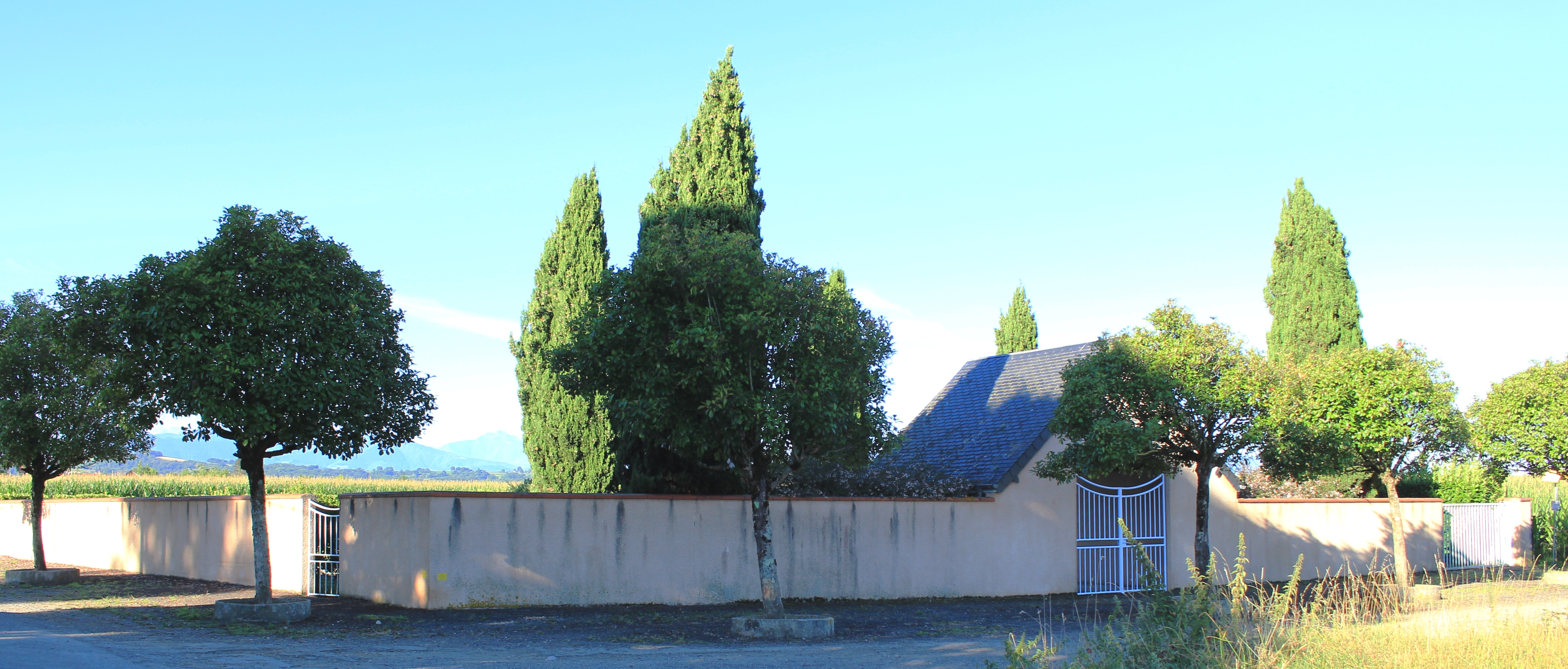 Cimetière de Bernac-Debat (Hautes-Pyrénées)